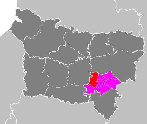 Maps of arrondissements and cantons of France: Arrondissement de Soissons - Canton de Vic-sur-Aisne.PNG